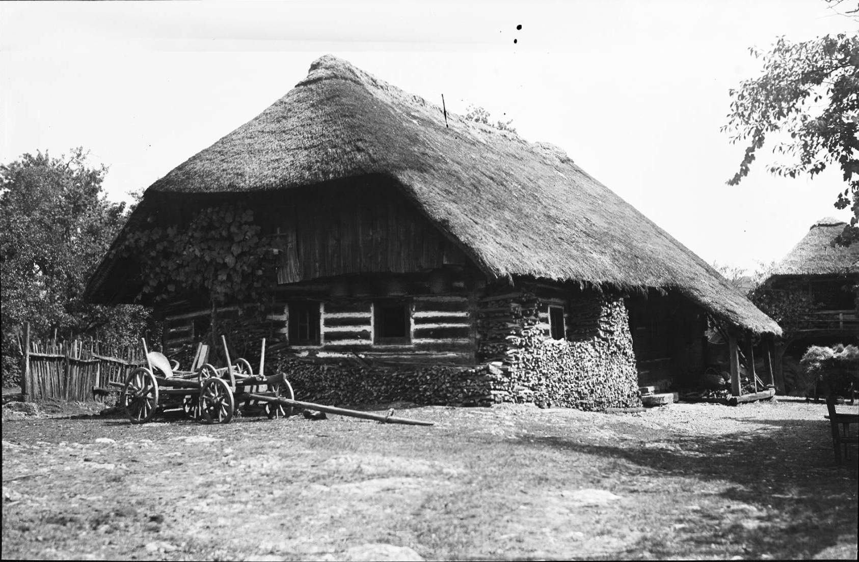 Hiša v Adlešičih